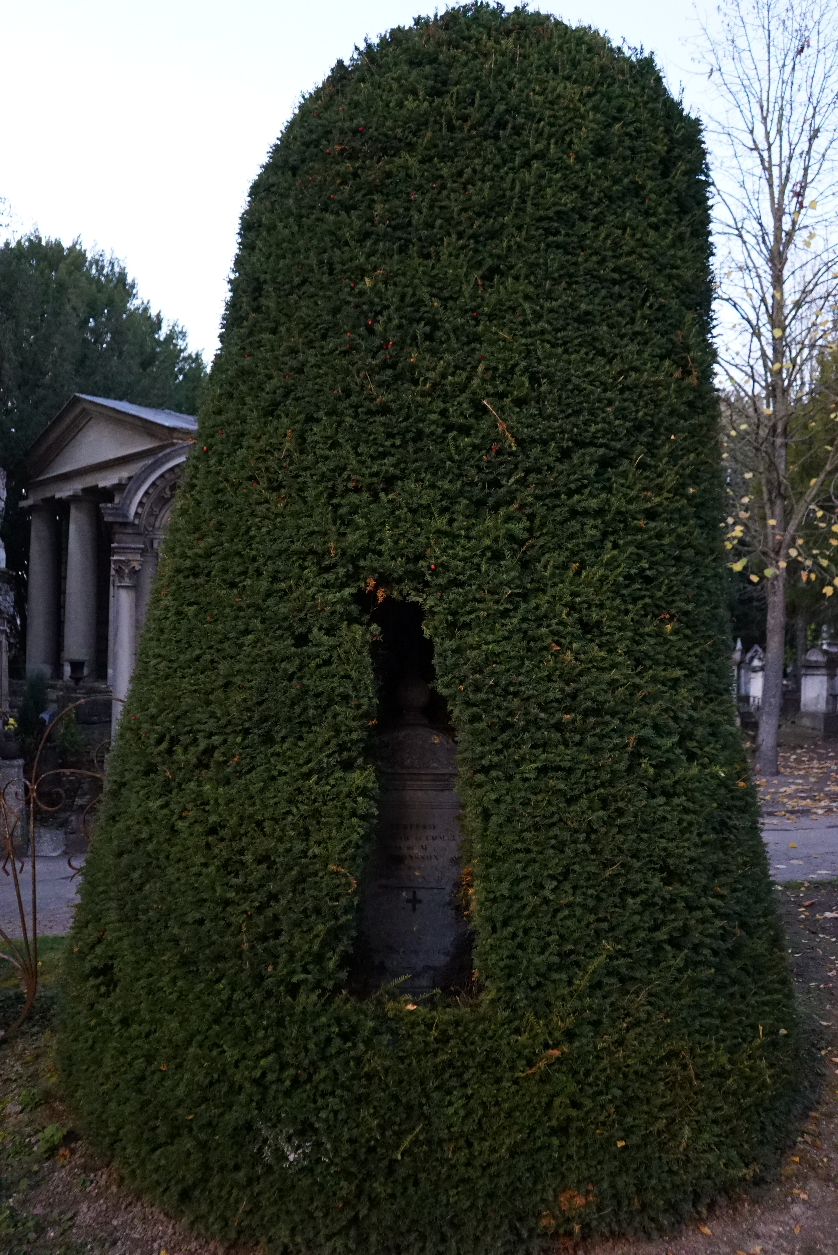 au cimetière de Reims, située dans la canton 8.